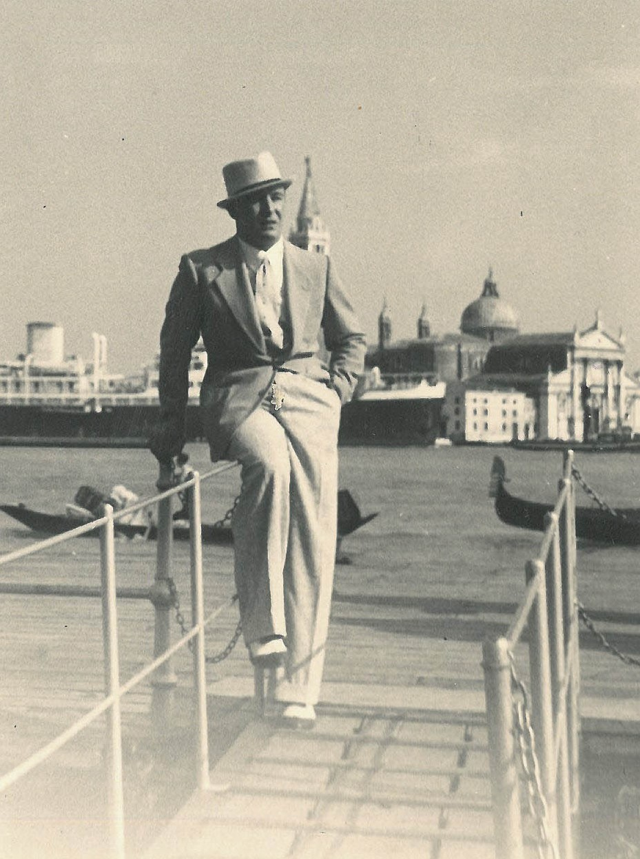 Ritratto di Erminio Bullio